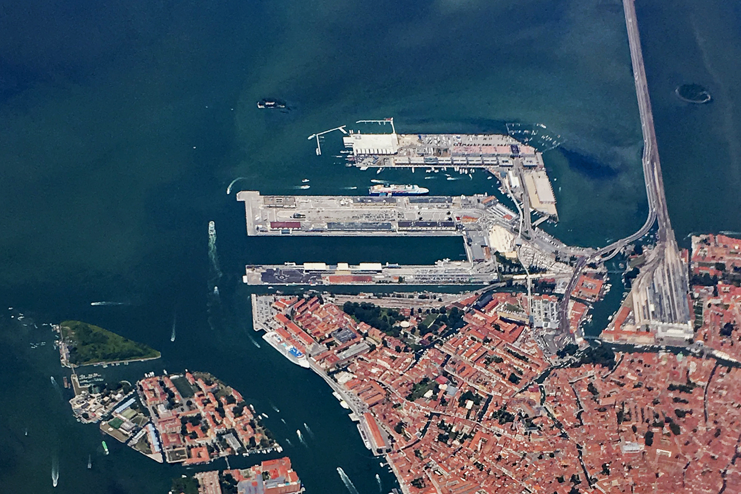 Aerial view of Venezia Terminal Passeggeri